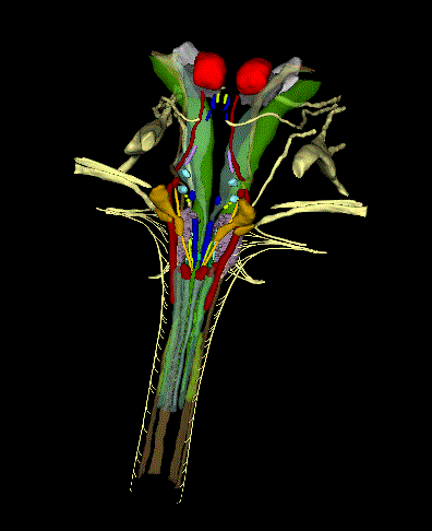 Entzefalo-enborrareen irudi honetan grisez irudikatuta daude Cuneatus eta Gracilis faszikuluak.